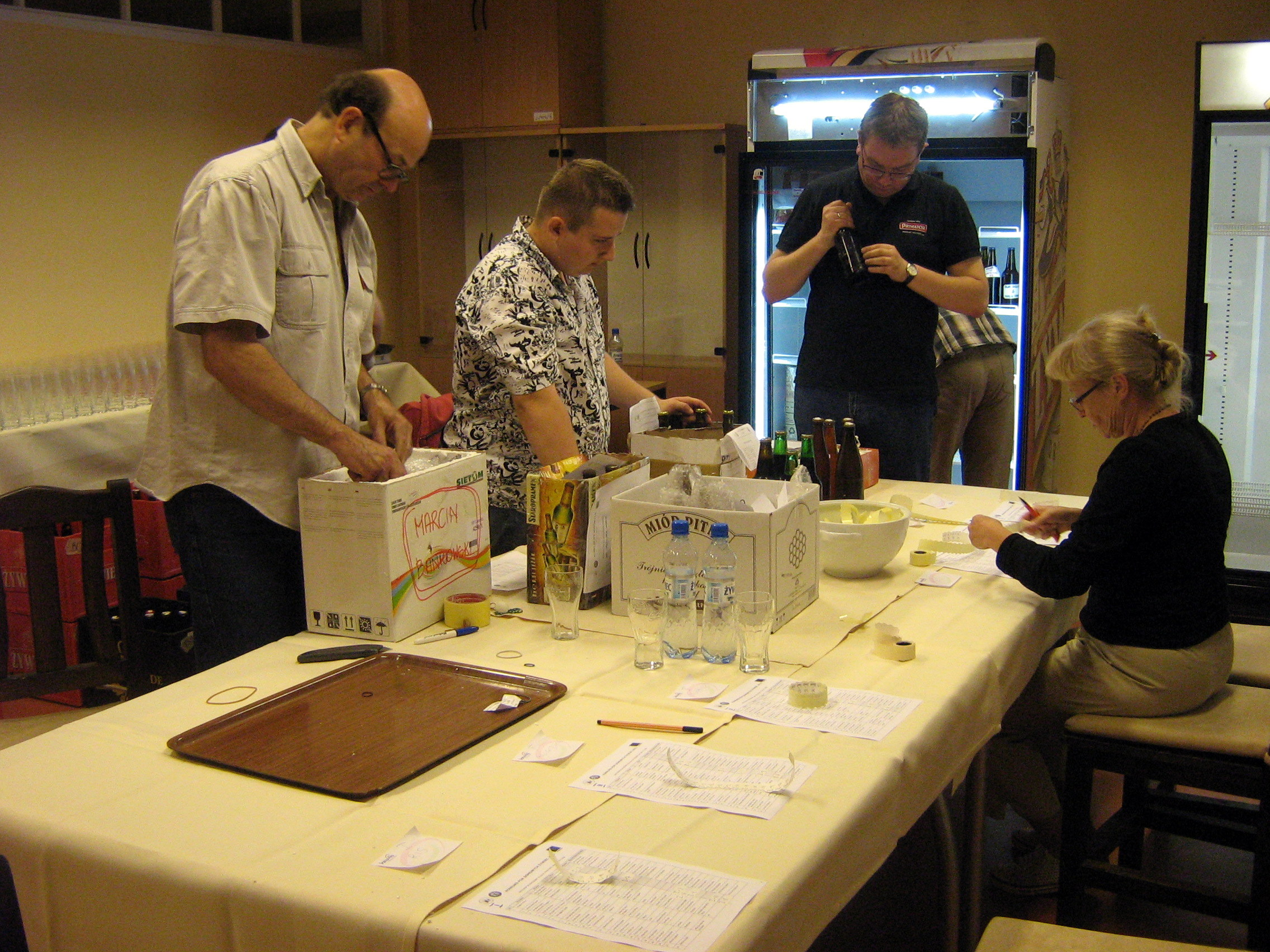 2011 rok